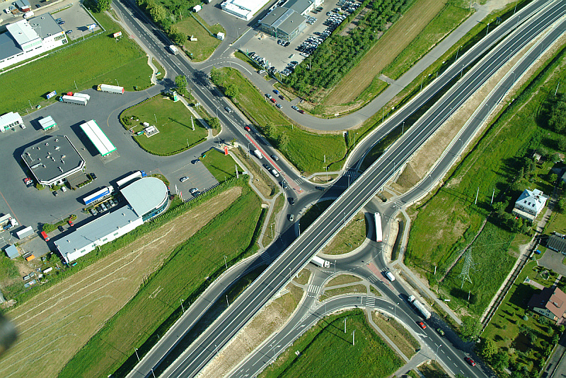 Skrzyżowanie dróg krajowych nr 2 i nr 50 w Stojadłach w ciągu obwodnicy Stojadeł. DK nr 50 przebiega górą, DK nr 2 przebiega na poziomie terenu otaczającego skrzyżowanie prostopadle do DK 50